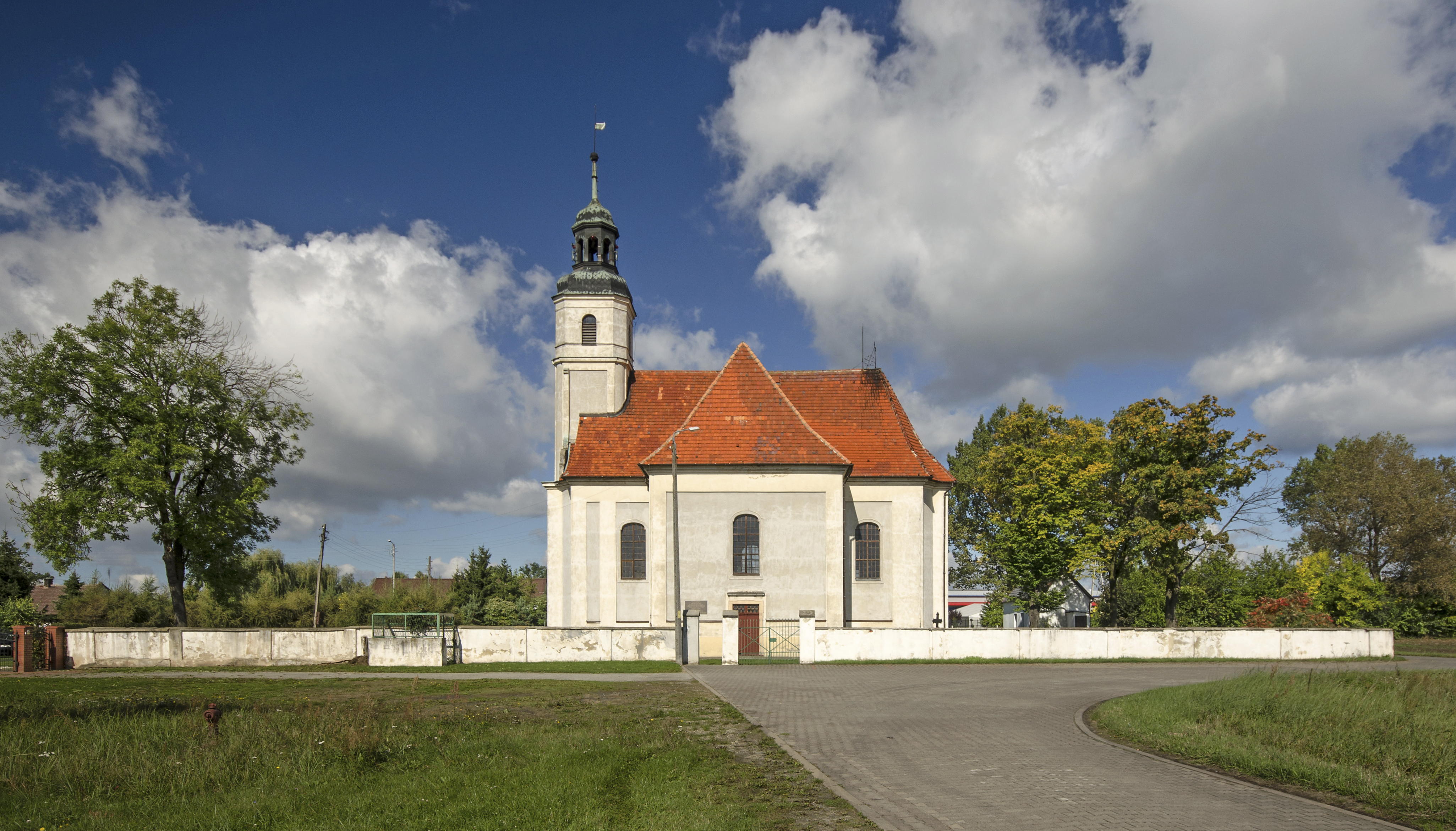 Cieśle, kościół fil. p.w. Matki Boskiej Tuchowskiej, 1718, 1930